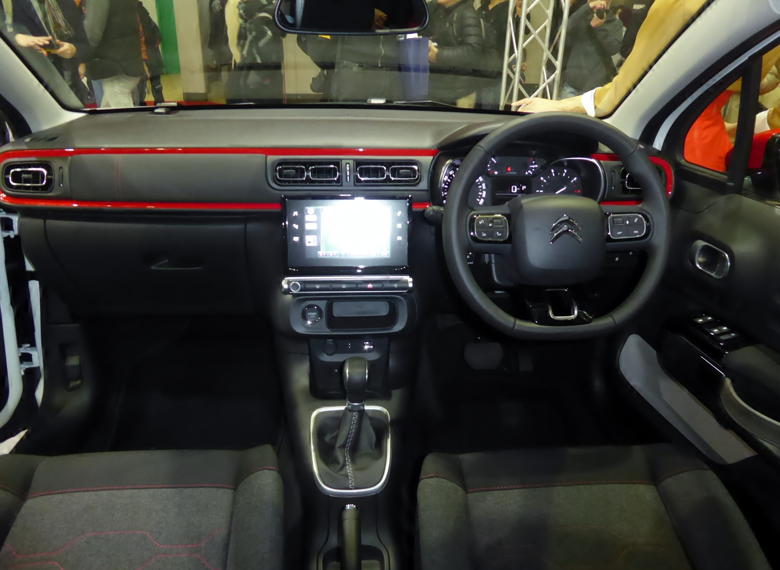 大阪モーターショー2017に於いてABA-B6HN01型シトロエン・C3シャインを撮影。